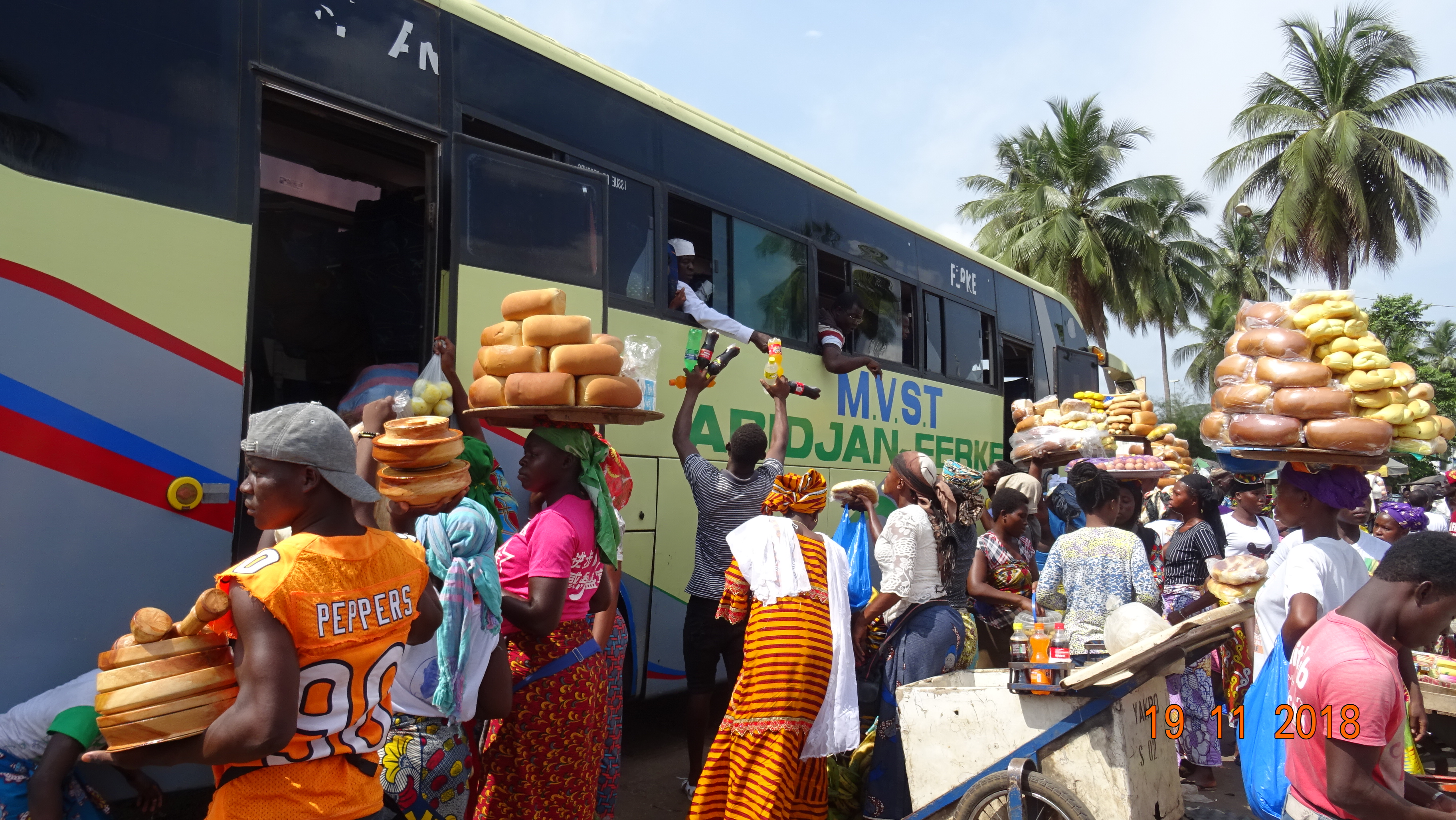 Yamoussoukro - Escale de bus, les marchand ambulants sont là ! This is an image with the theme "Africa on the Move or Transport" from: Ivory Coast